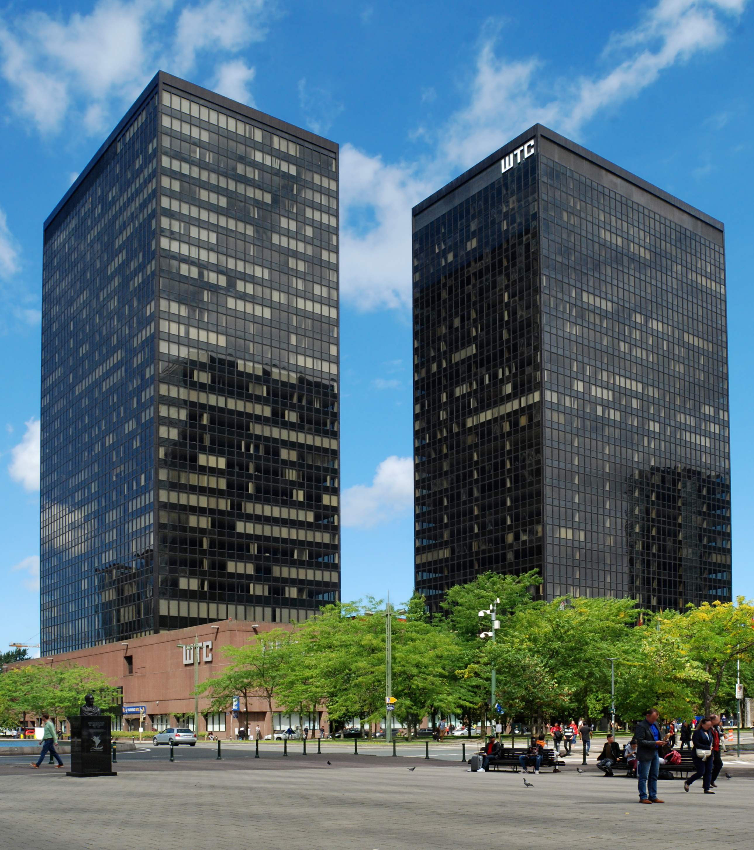 Belgique - Bruxelles - World Trade Center I et II (architecture fonctionnaliste - 1974 - René Stapels, Groupe Structures, André et Jean Polak)